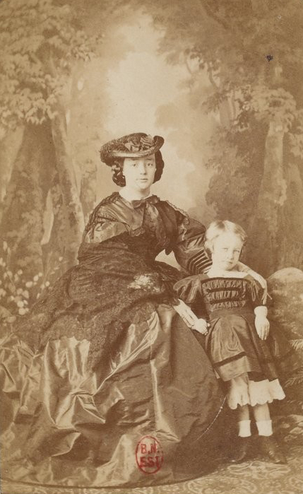 Amélie Greffulhe, comtesse Paul Charles de Ségur [Recueil. Album de famille de la comtesse de Luçay, née Villeneuve de Vence]